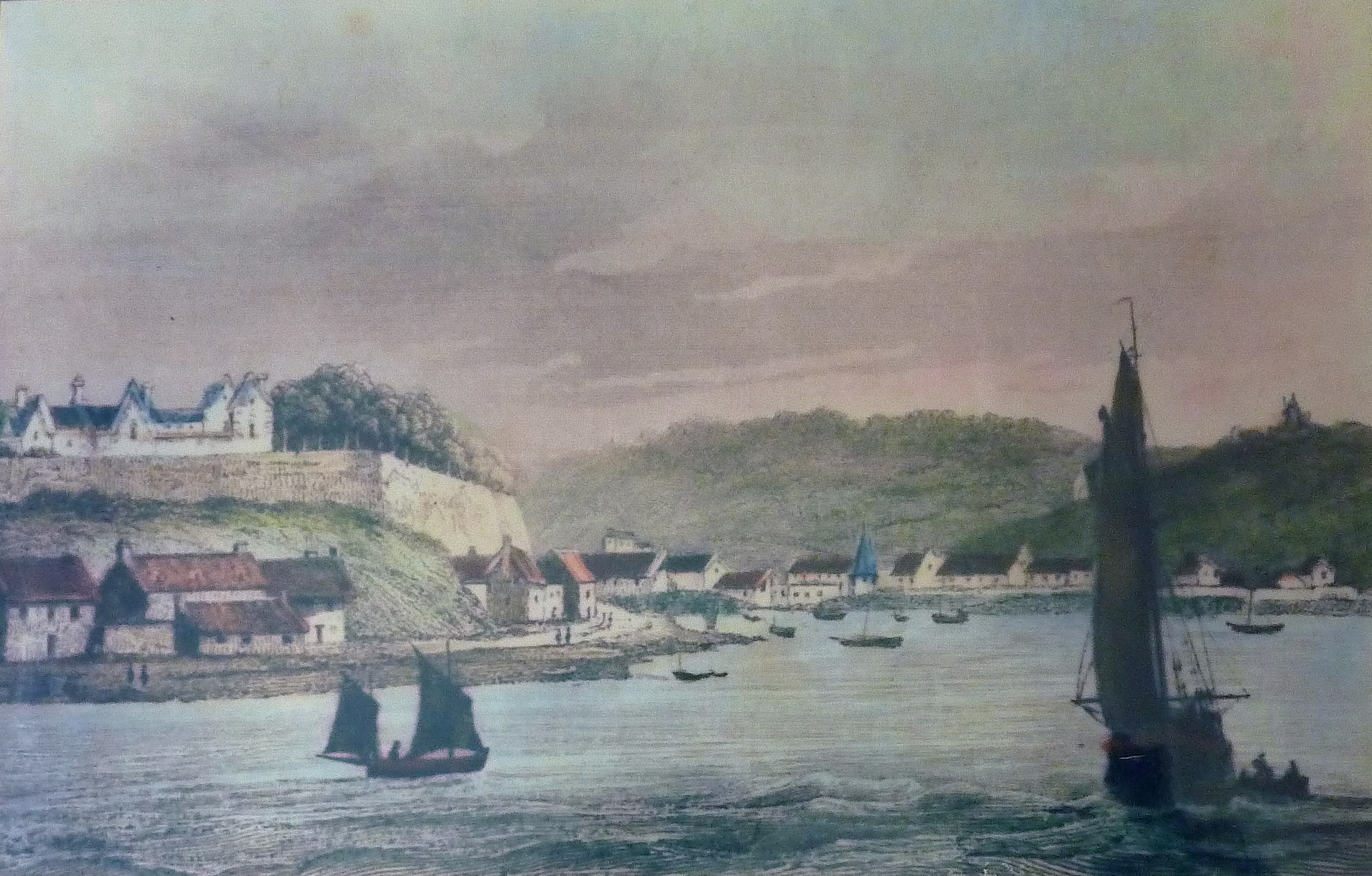 Audierne dans la première moitié du XIXe siècle (dessin de Bachelot de La Pylaie, musée maritime du Cap-Sizun).